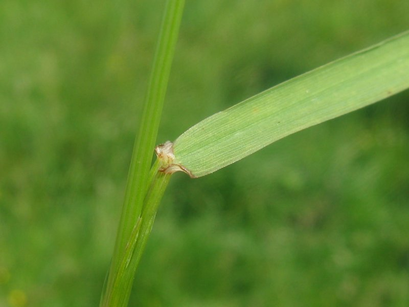 Wiesen-Schwingel (Festuca pratensis), Gragetopshof